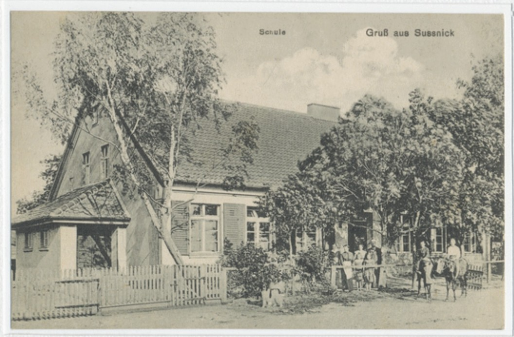 Grundschule in Sußnick, ehemaliges Ostpreußen, jetzt zu Polen gehörend, Bild verm. um 1930 erstellt, wird heute als Wohnhaus benutzt